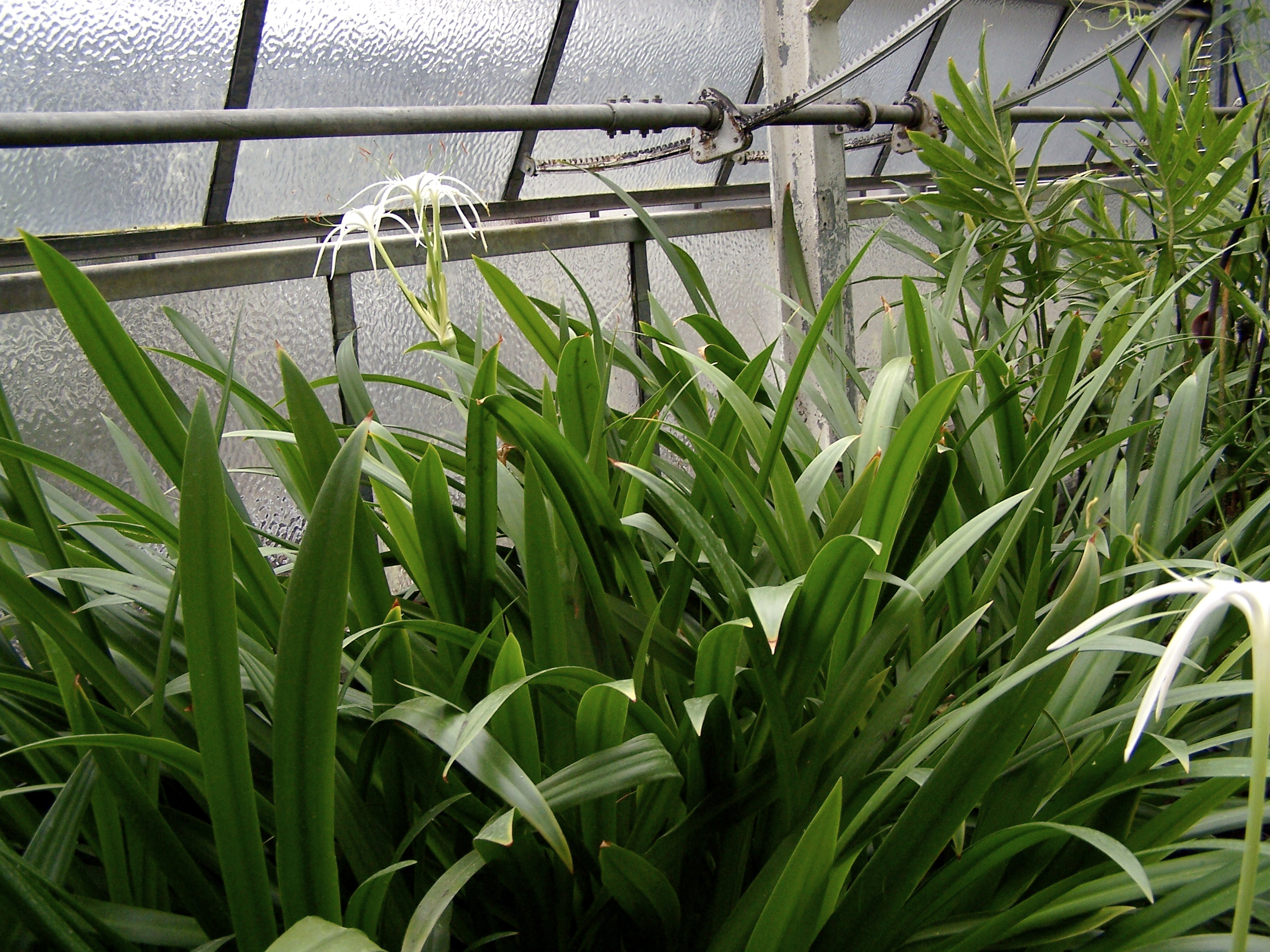 Hymenocallis littoralis 17 juin 2006 Vieux jardin botanique de Göttingen